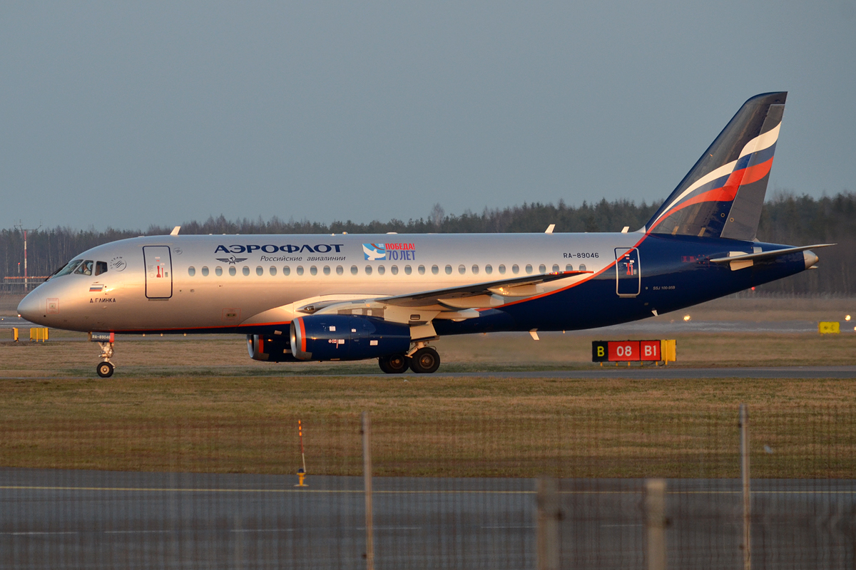 Aeroflot, RA-89046, Sukhoi SuperJet 100-95B